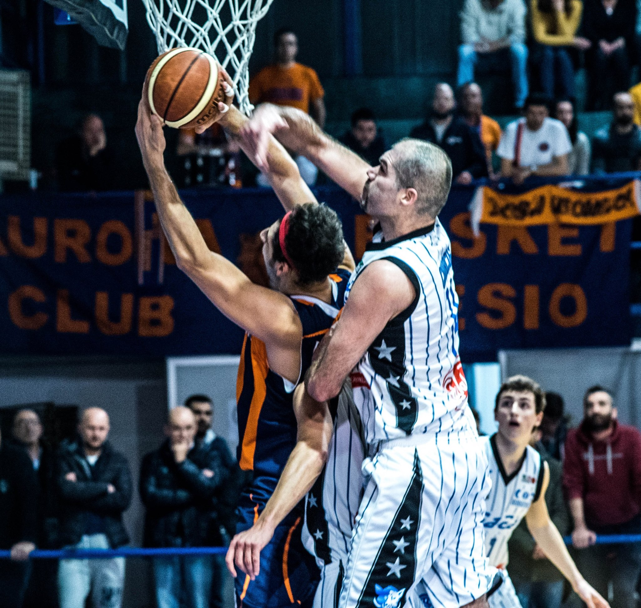 Roberto Chiacig in maglia Gagà Orzinuovi nella partita contro l'Aurora Desio